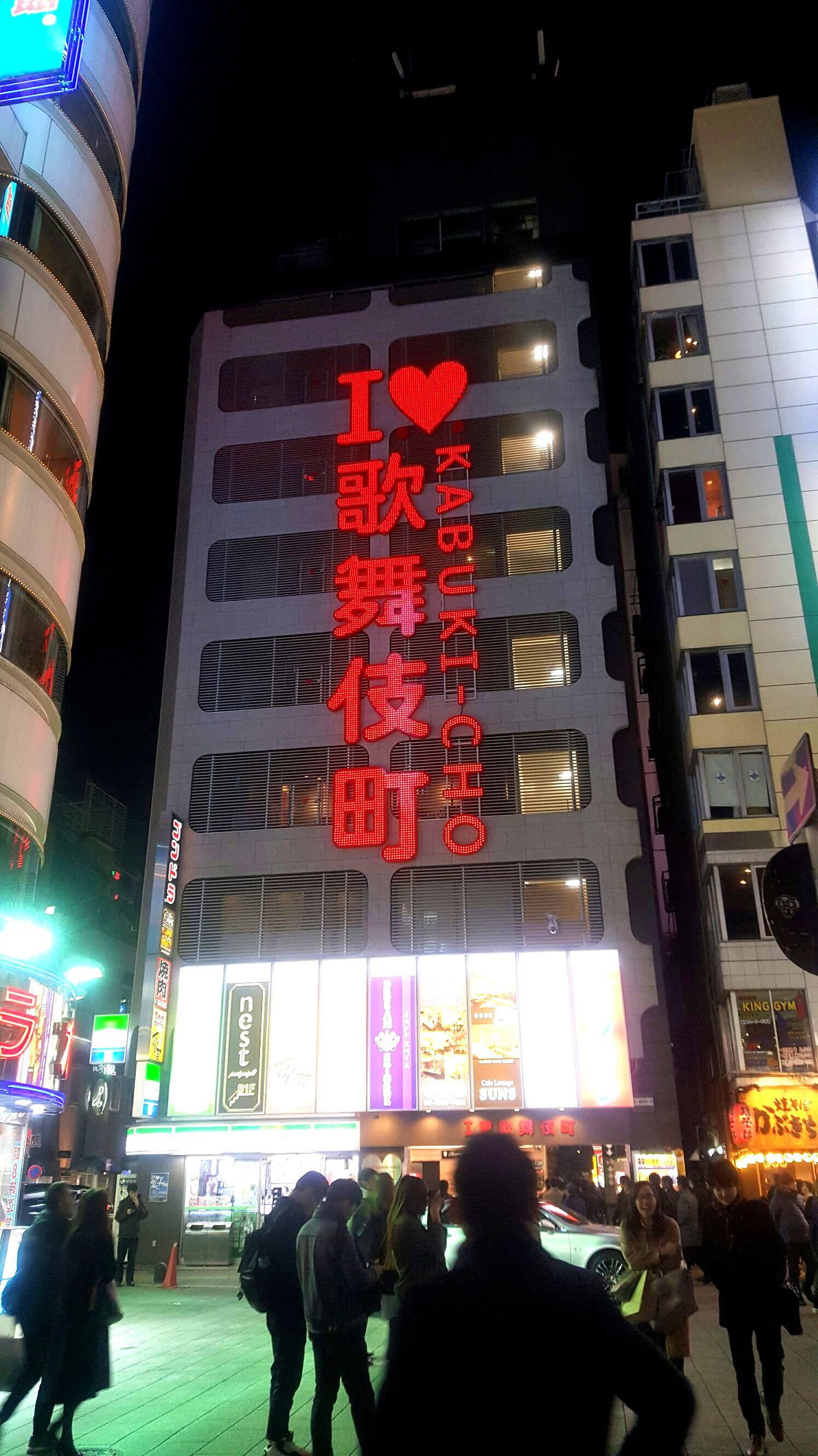 新宿区歌舞伎町1-14-7林ビル